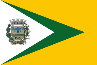 Bandeira de Itobi - SP - Brasil.